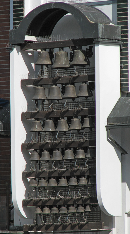 Beschreibung: Glockenspiel am Fünfgiebelhaus in Rostock / Germany Fotograf: Darkone, 17. August 2005